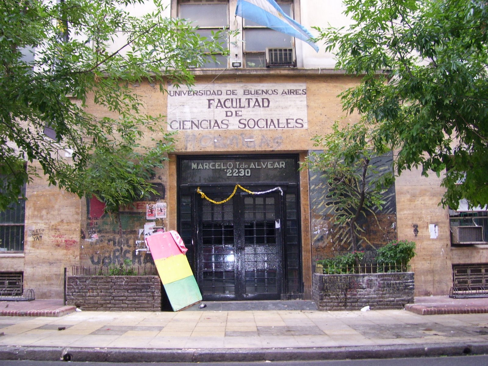 Facultad de Ciencias Sociales (UBA), Edificio de calle Marcelo T. de Alvear